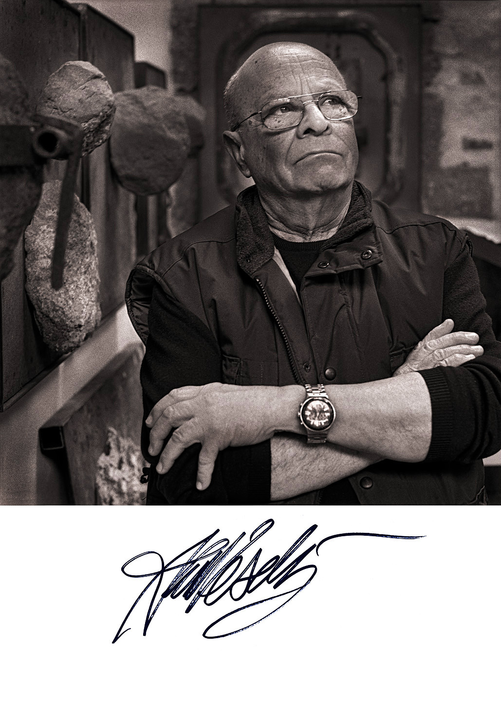 Jiří Jiroutek´s picture Cyklus: Osobnosti